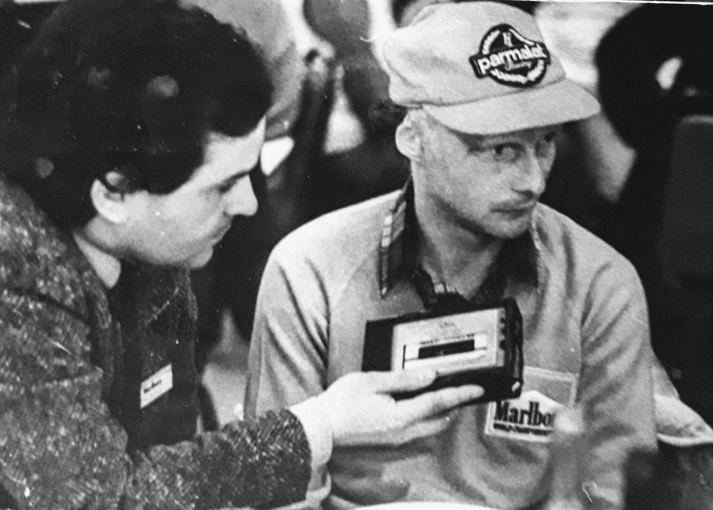 Ђорђе Ђенић интервјуише Ники Лауду, у Београду 1982. године. Фото:Драган Бибић (по одобрењу).